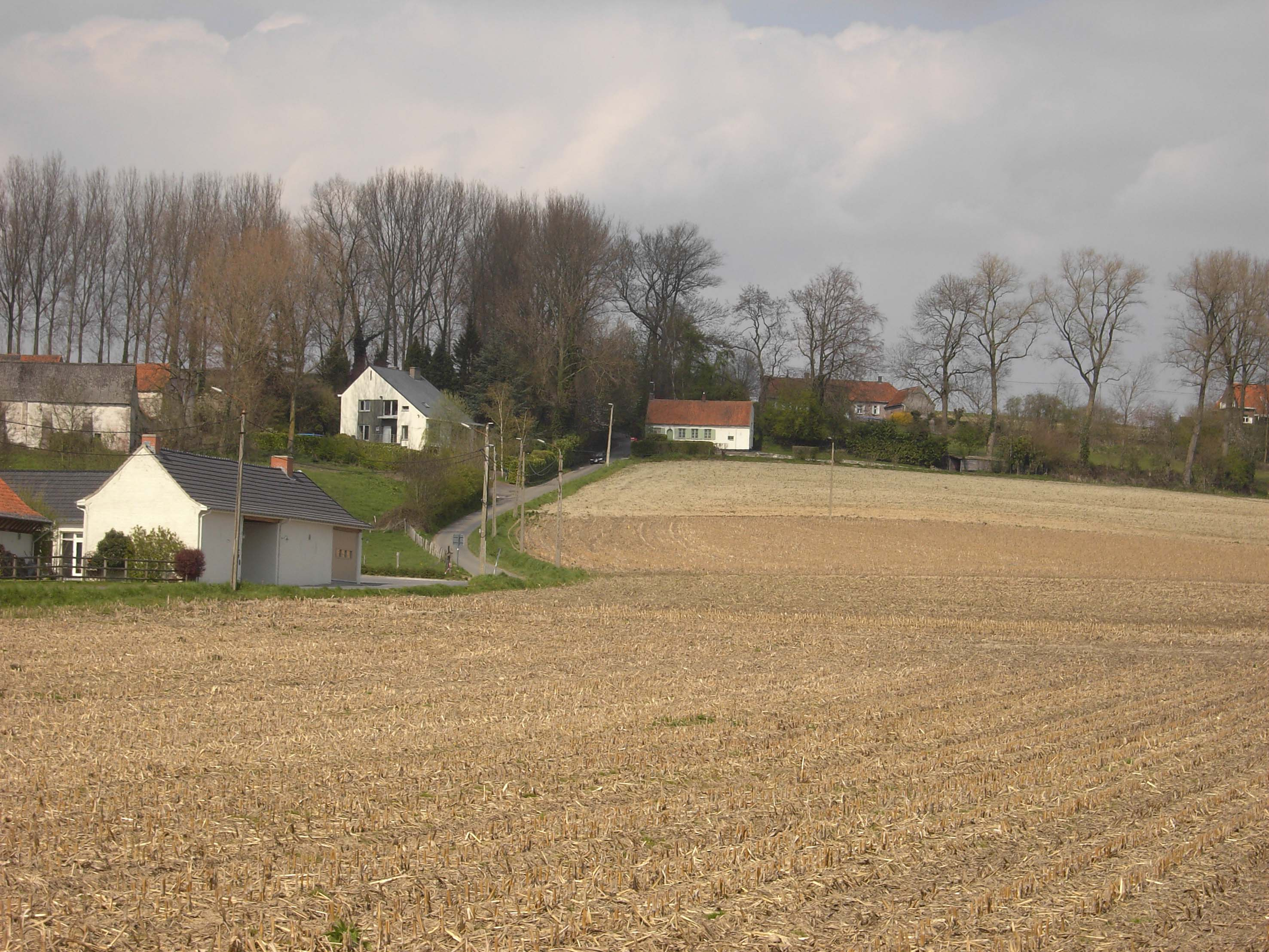 Maarkedal - Etikhove - Ladeuze - helling - Belgium